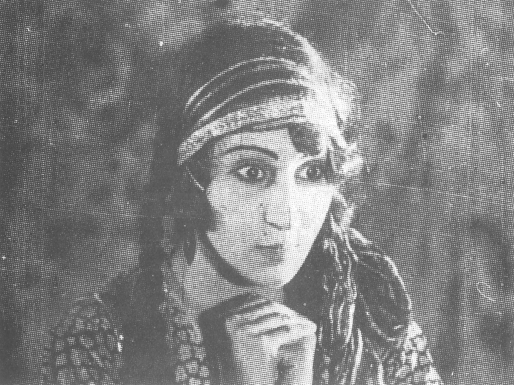 Roohangiz Sami-Nejad "Dokhtare Lor ya irane druz va emruz" (1933)